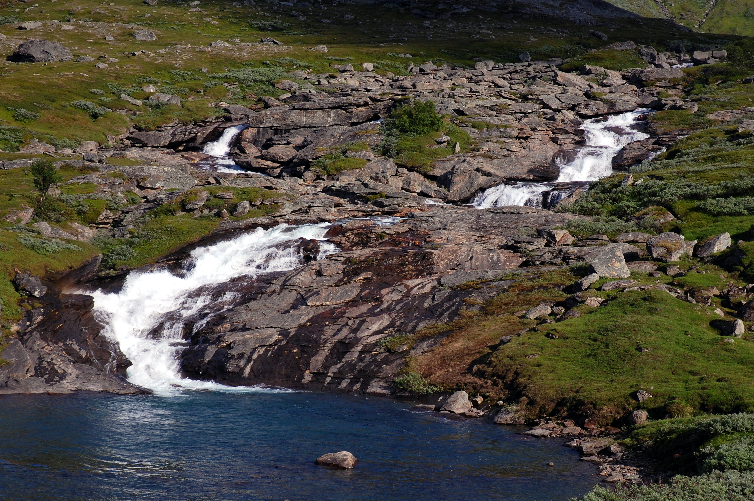 Jokk, Viejejåkhå, Veijevagge, Padjelanta